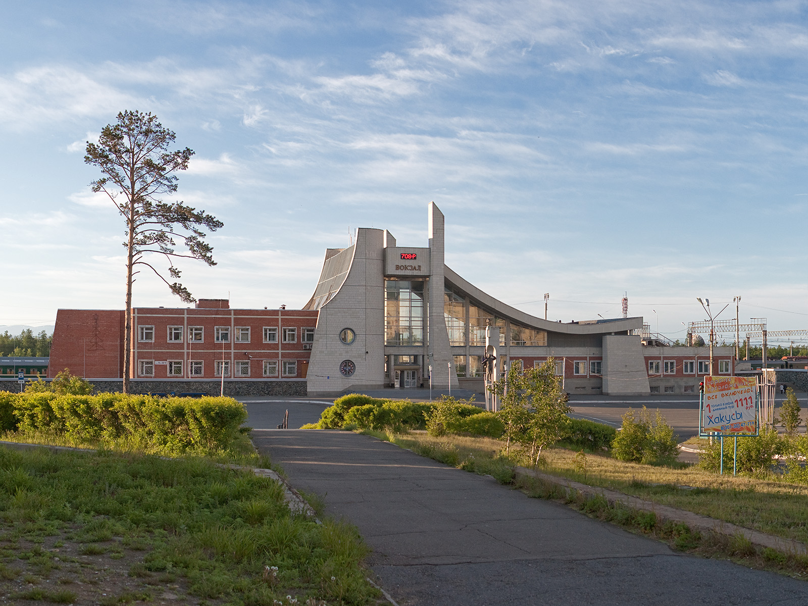 Железнодорожный вокзал